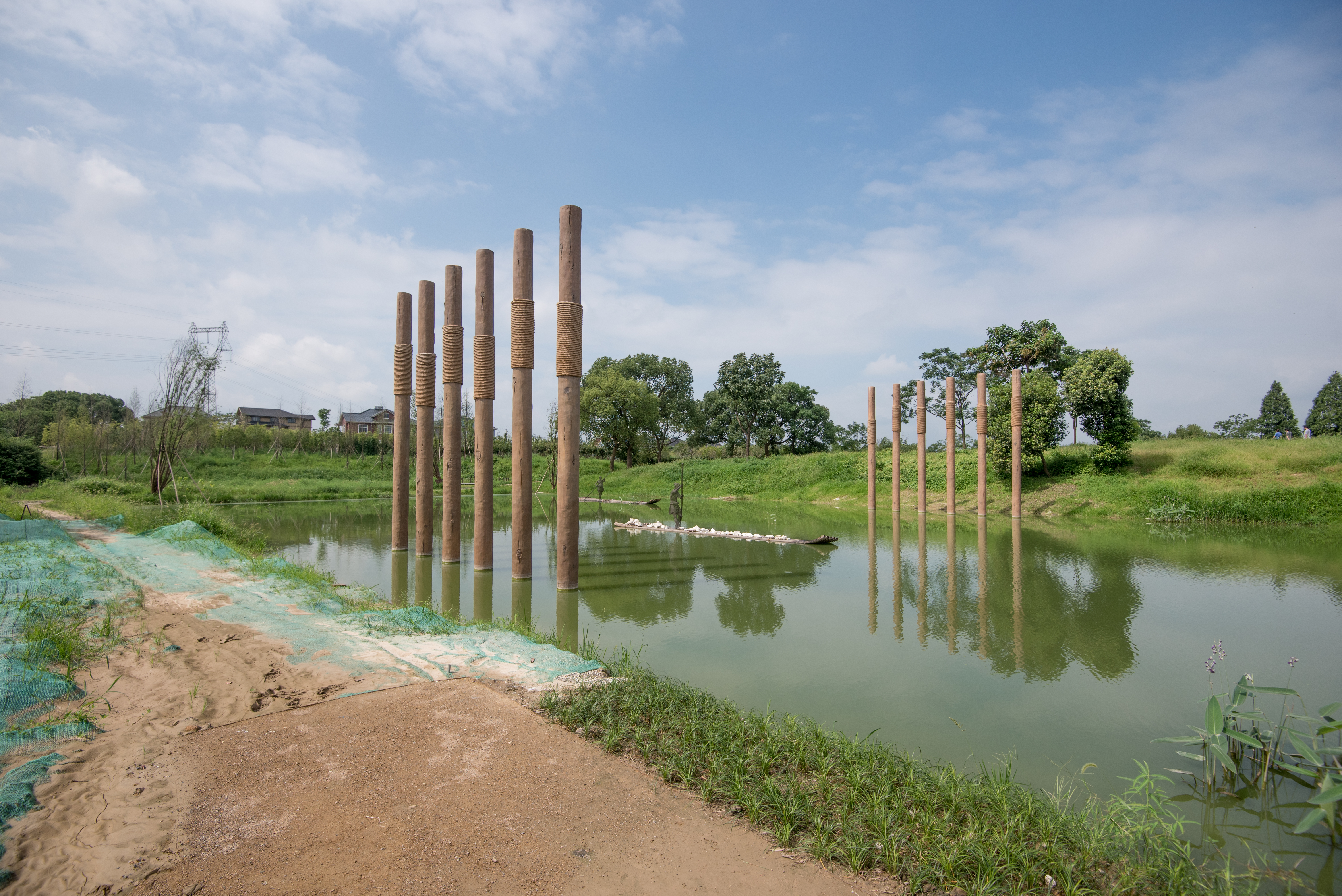 良渚考古遗址公园——南城墙水城门遗址展示